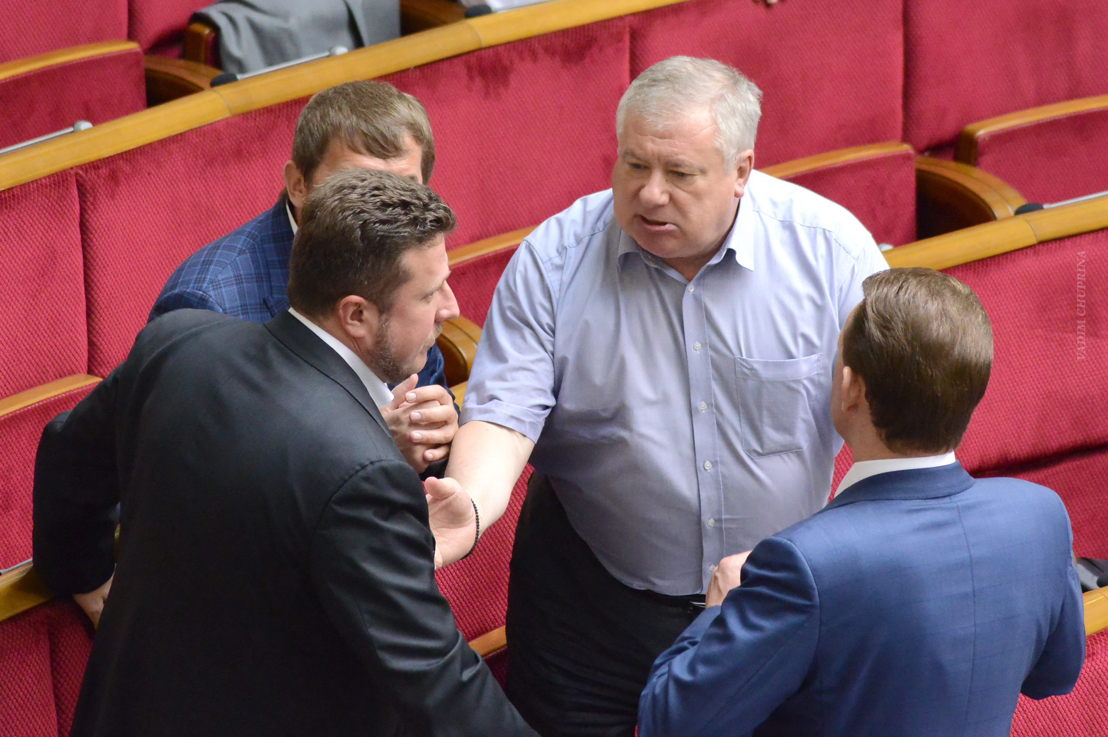 ВЕРХОВНА РАДА УКРАЇНИ 2016 , фото Вадим Чуприна